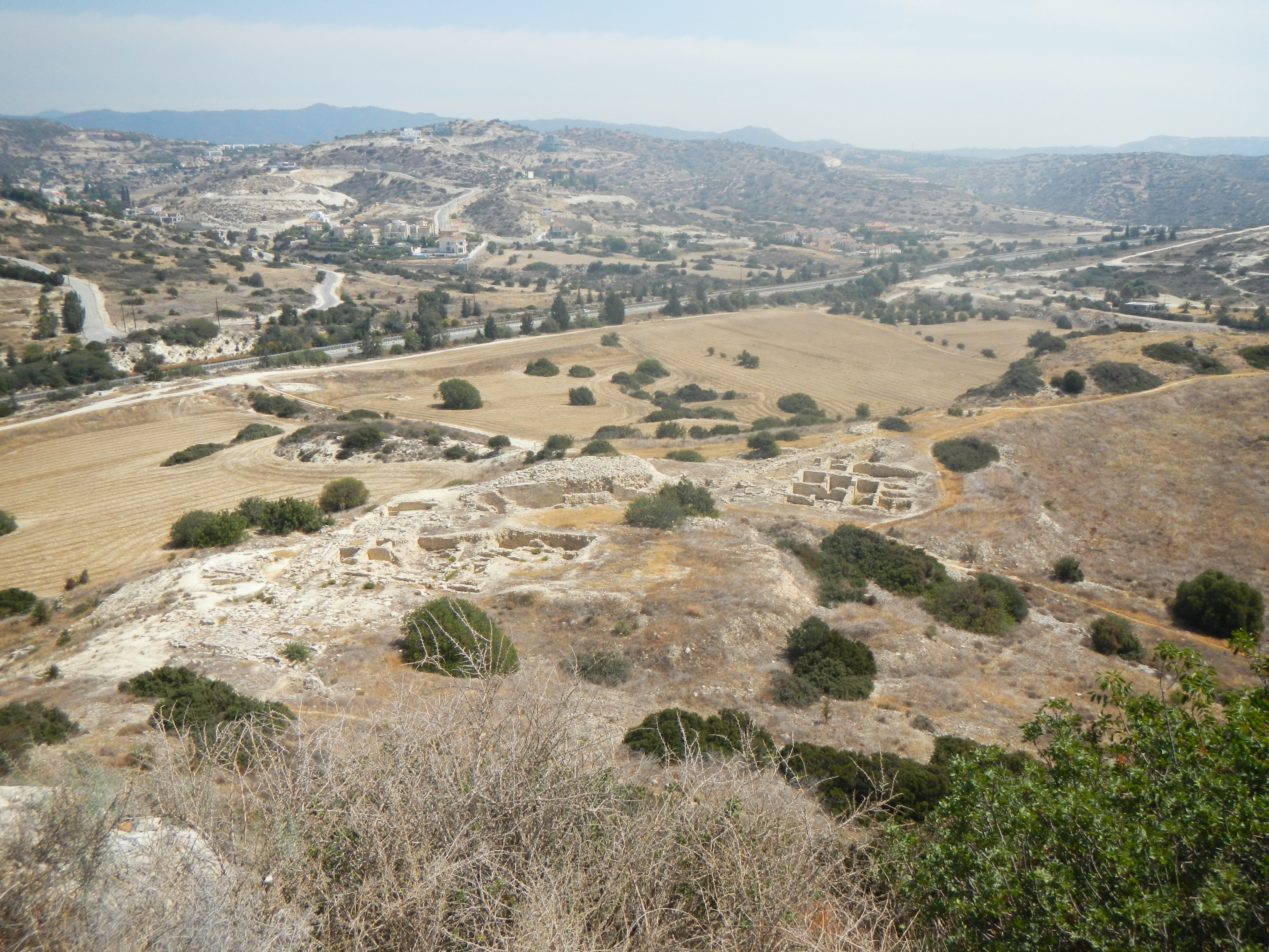 Руины Аматуса на склоне холма